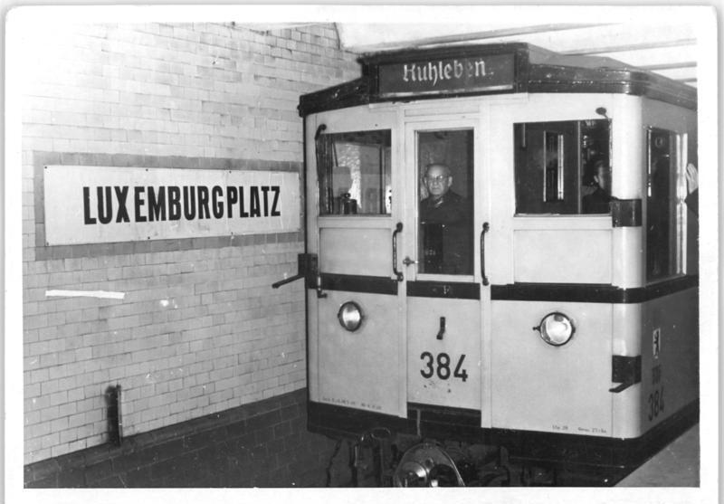 Zentralbild Gott-Schä U-Bahnhof Luxemburgplatz Am 1. Mai 1950 wurde der Berliner U-Bahnhof Schönhauser Tor in Luxemburgplatz umbenannt. 6386-50